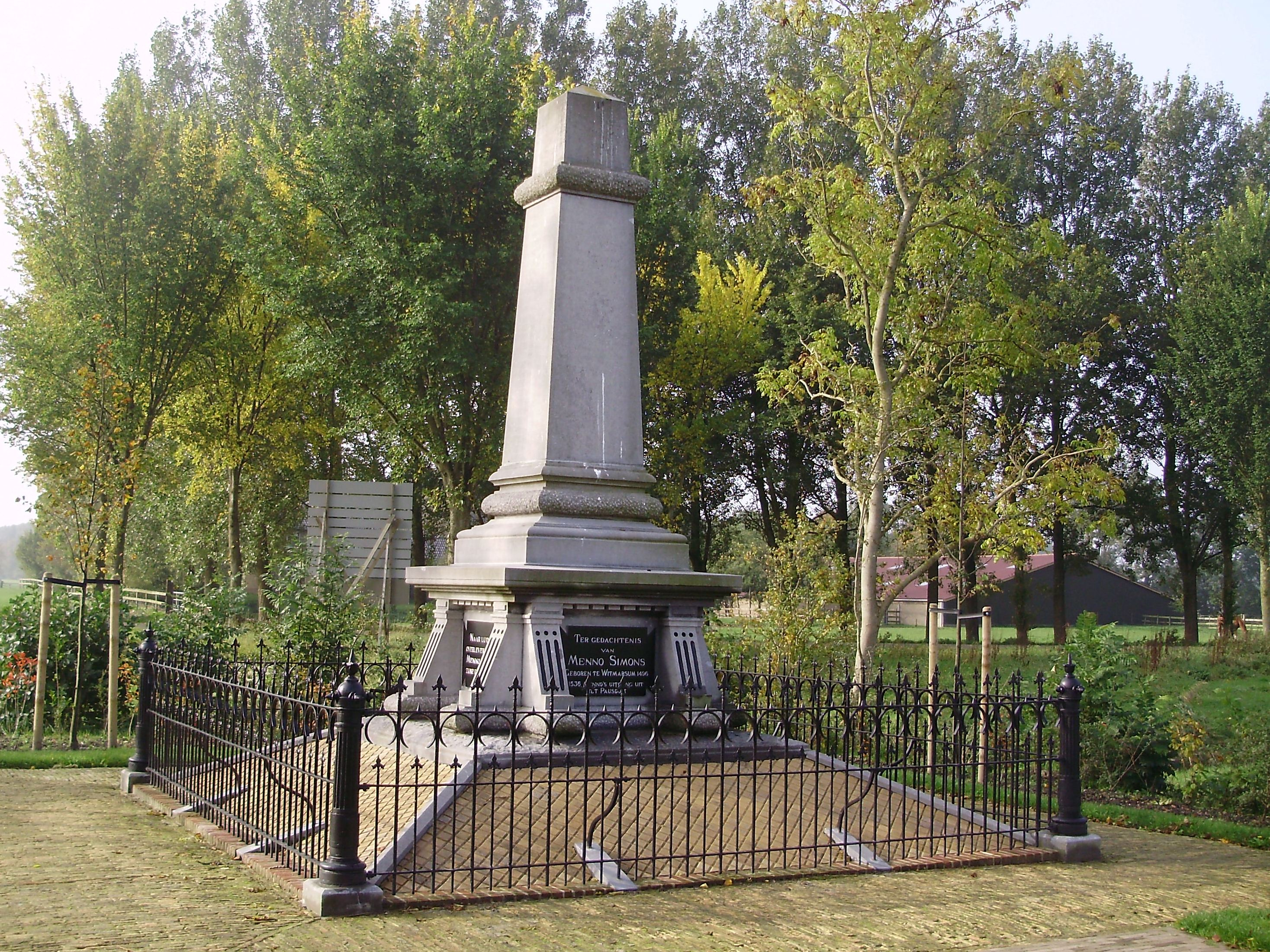 Het Gedenknaald voor Menno Simonsz bij Witmarsum in gemeente Súdwest Fryslân